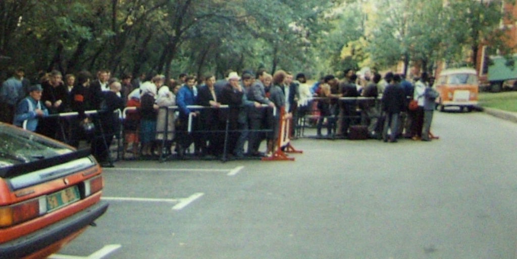 Rußlanddeutsche Aussiedlungsbewerber vor der Botschaft der Bundesrepublik Deutschland in Moskau Anfang Sept.1988